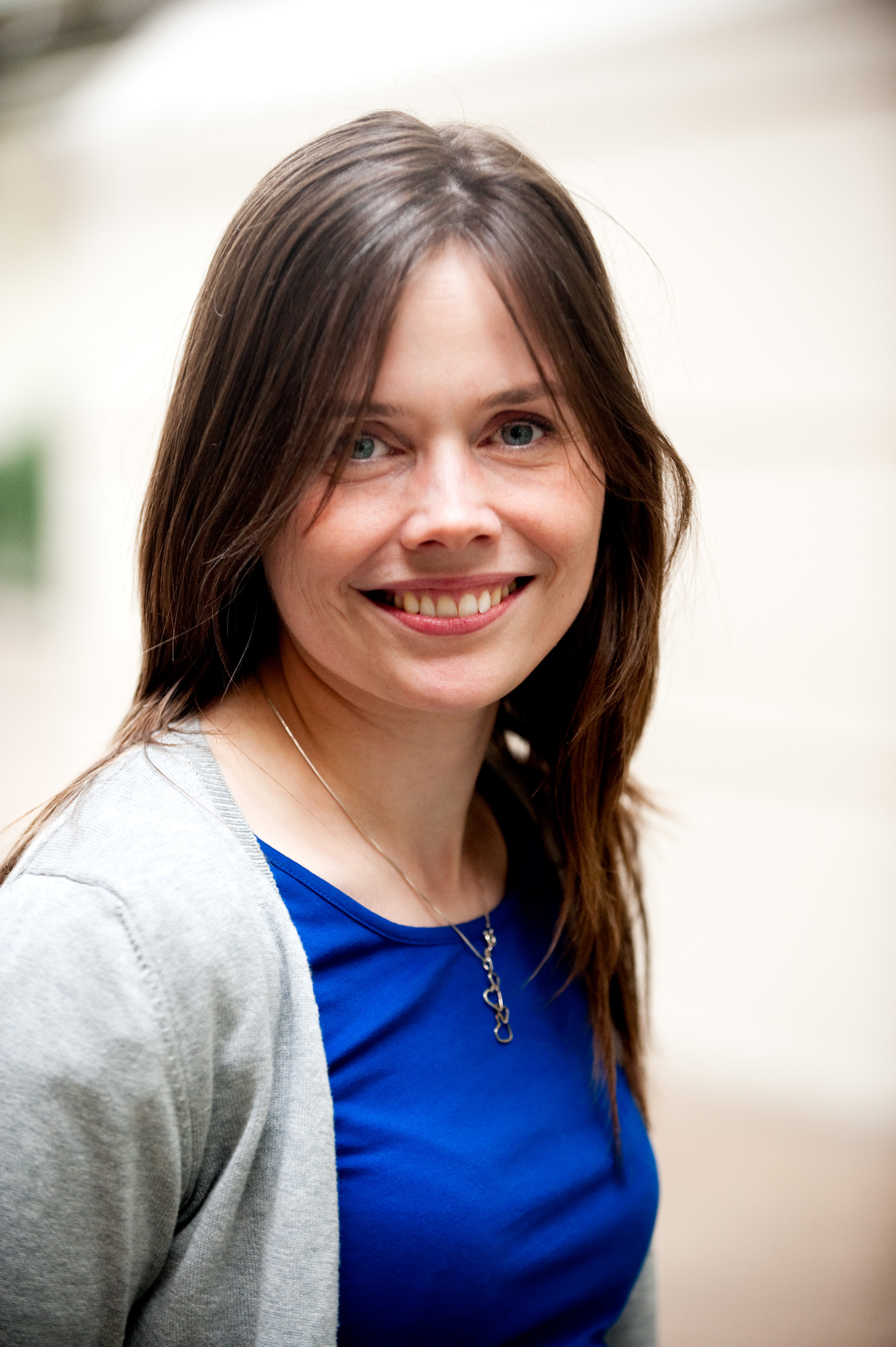 Katrín Jakobsdóttir, undervisnings- forsknings- og kulturminister i Island, samt samarbejdsminister i Nordisk Ministerråd.